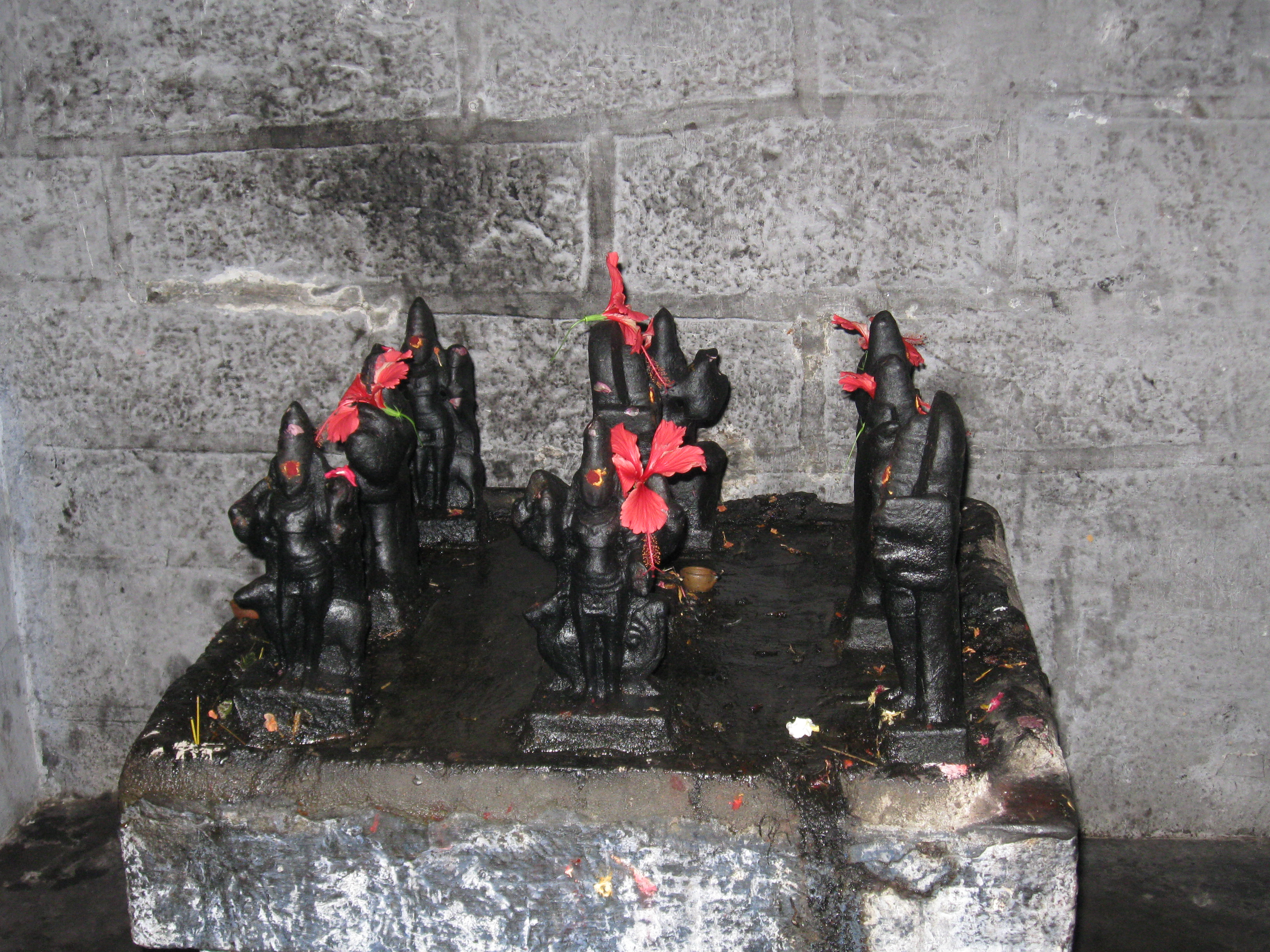 நவகிரக சிலைகள்